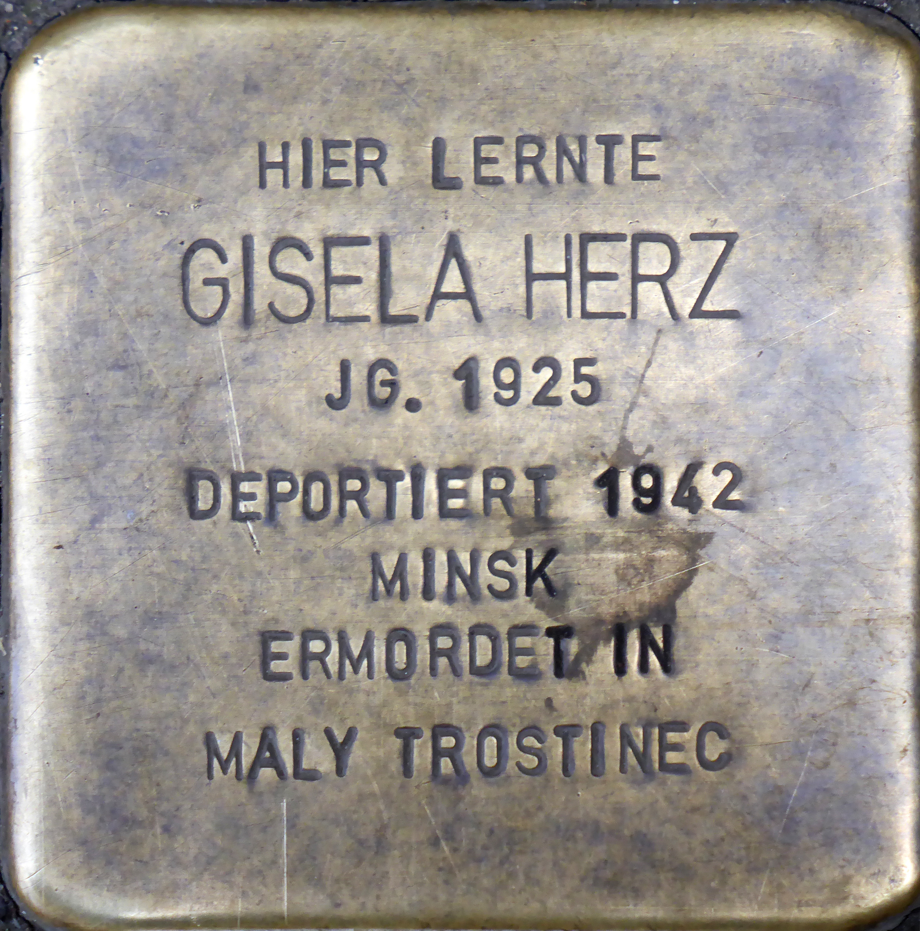 Stolperstein: Gisela Herz (Georgsplatz 10), Köln.